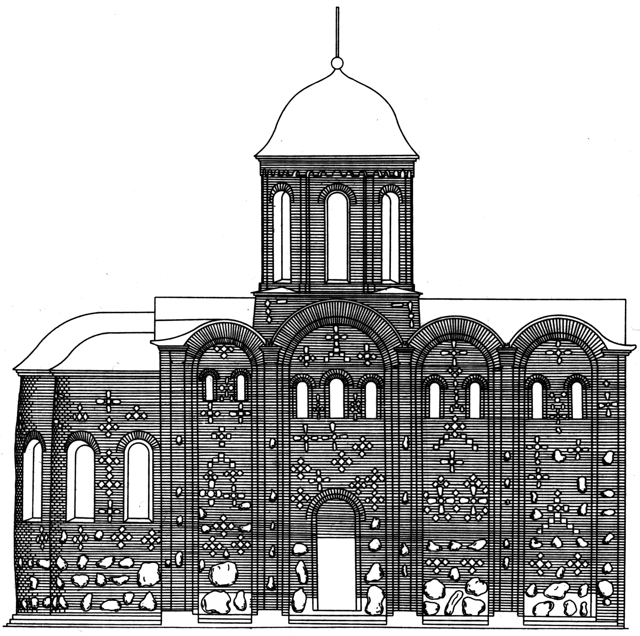 Реконструкция Коложской церкви академика архитектуры Ивана Ивановича Горностаева 1864 года.